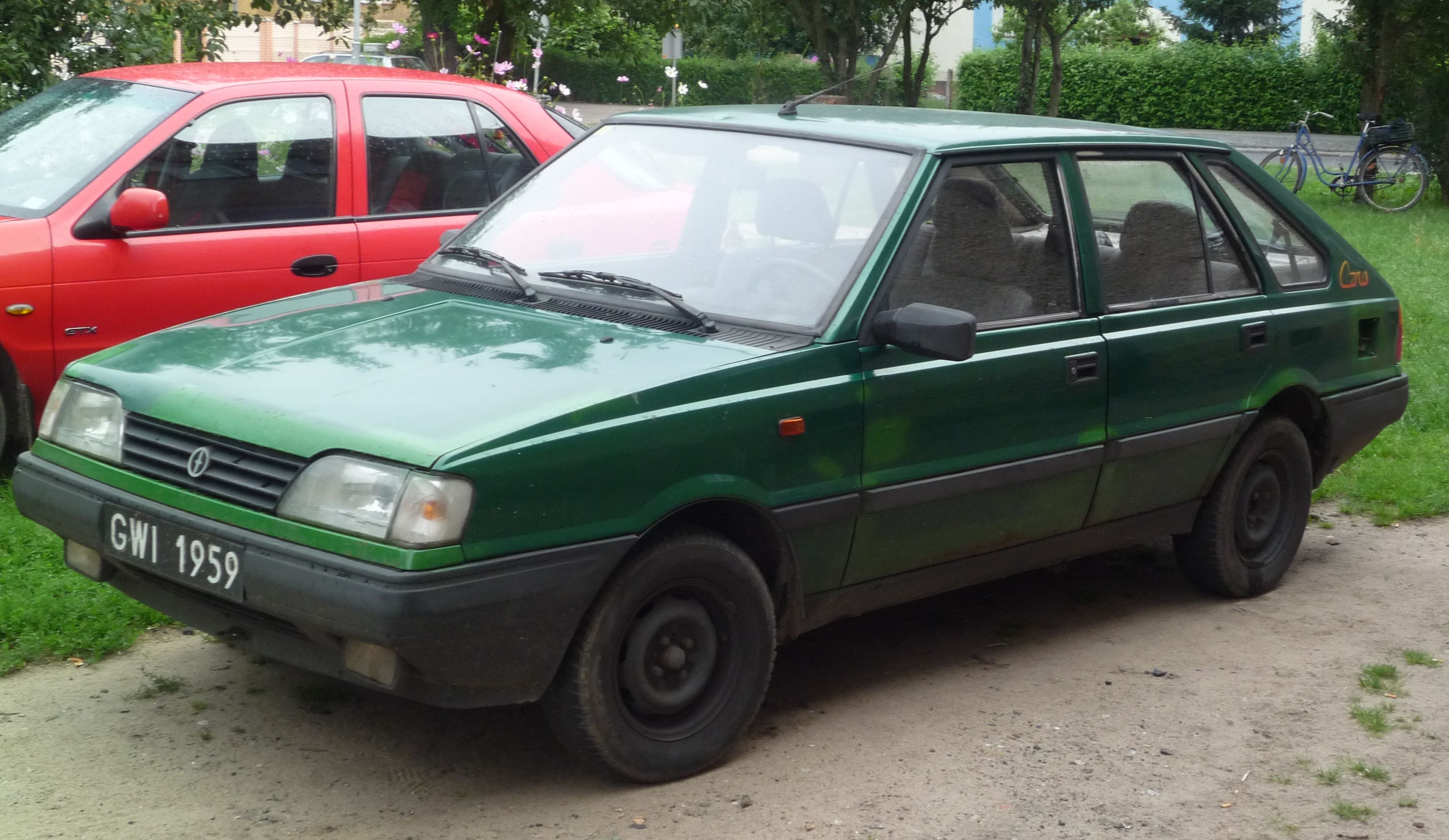 FSO Polonez Caro MR'93 1.6 GLI w Słubicach.